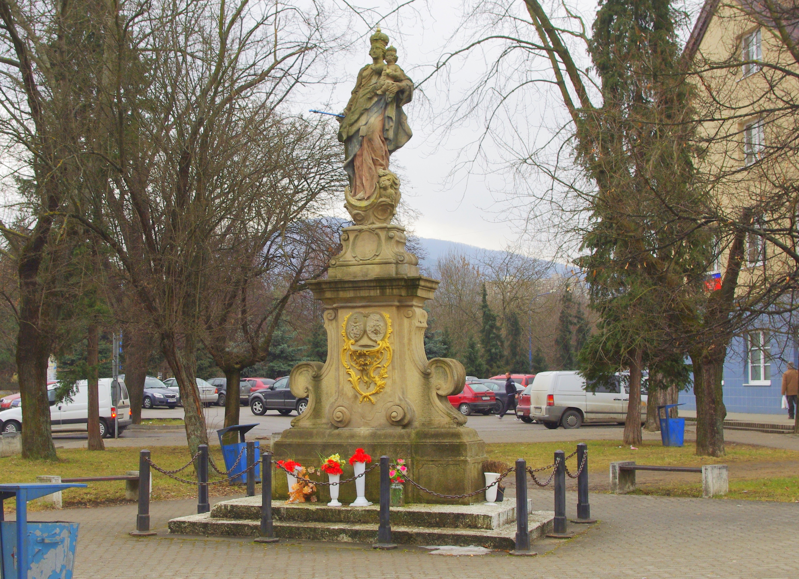 Mariánska socha z polovice 18. storočia na námestí Matice Slovenskej v Dubnici nad Váhom This medium shows the protected monument with the number 302-715/2 in the Slovak Republic.